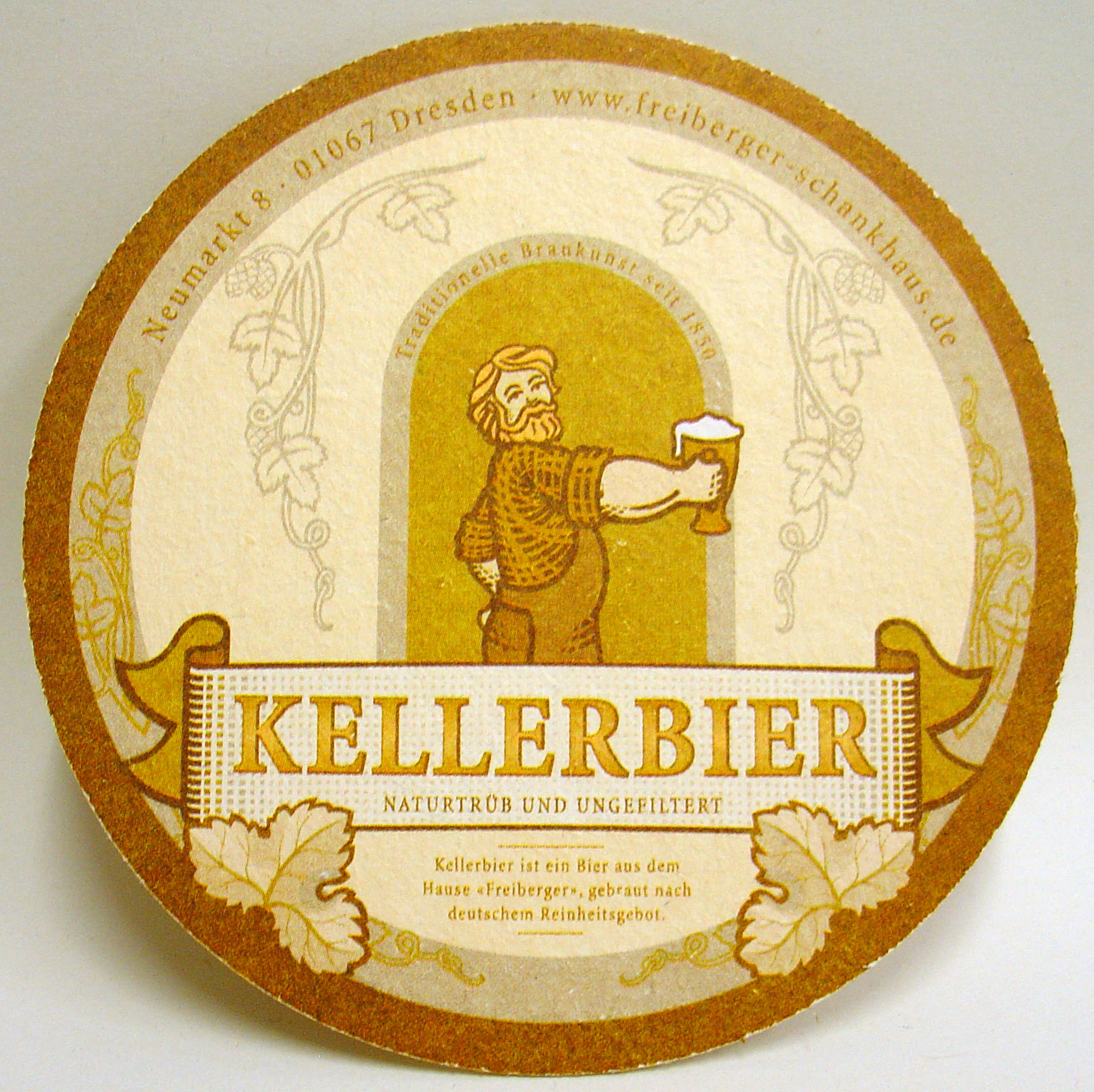 Bierdeckel des Kellerbieres der Freiberger Brauerei